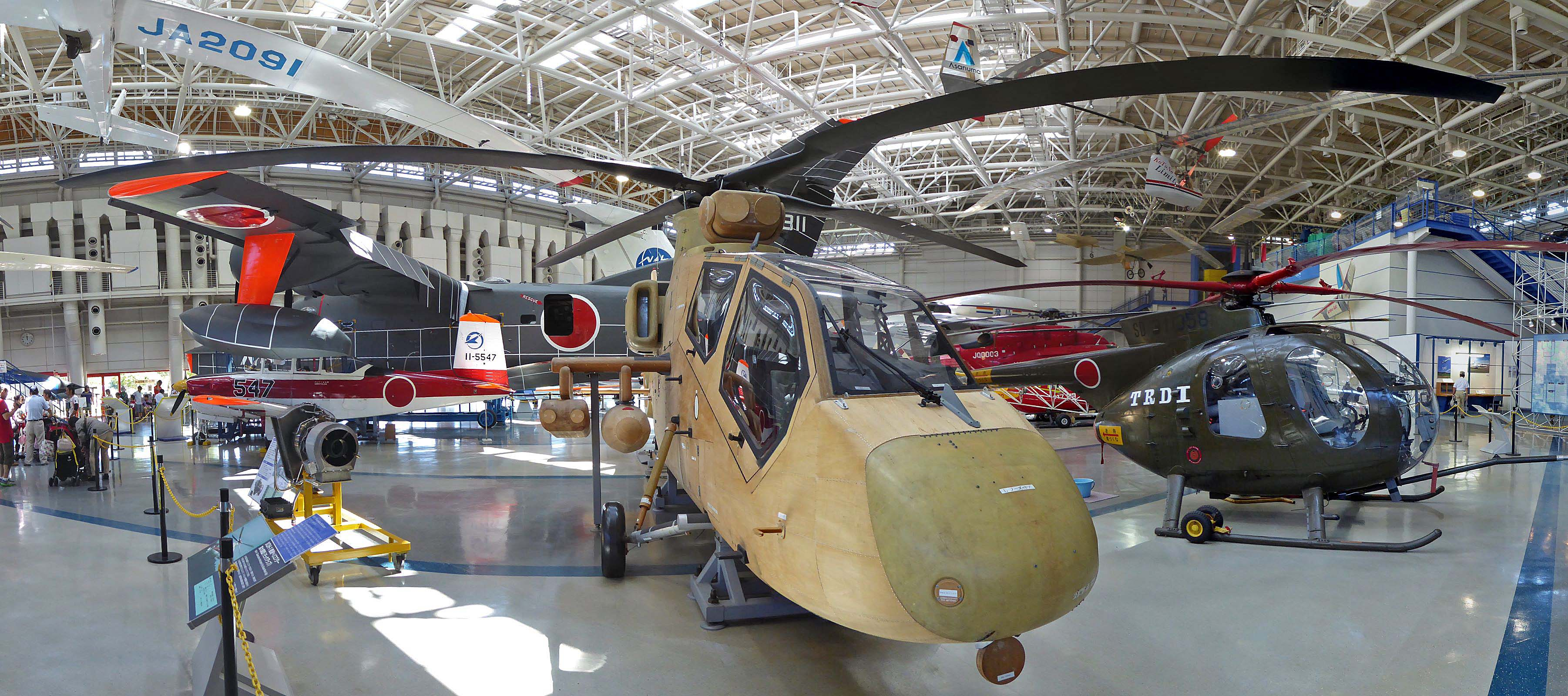 XOH-1 Mock up